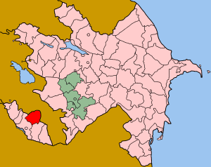 Map of Azerbaijan showing Shakhbuz (Şahbuz) rayon.